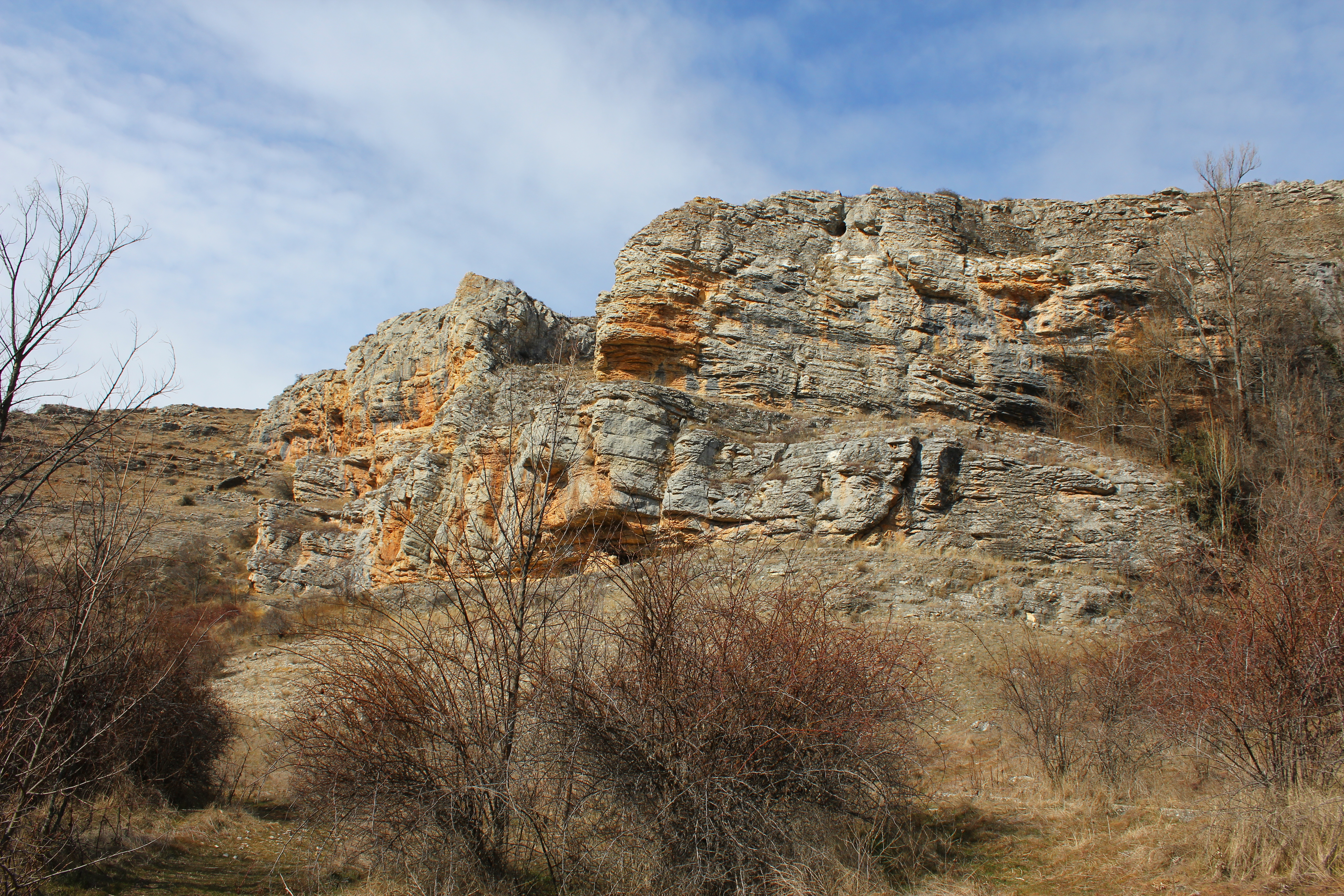 Altos de Barahona This is a photography of a Site of Community Importance in Spain with the ID: ES4170148. Natura2000 entry, EEA entry